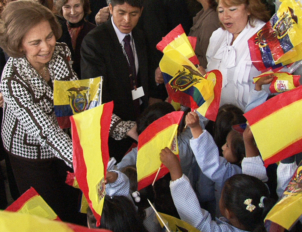 Hospital "Un Canto a la Vida", Sur de Quito-Ecuador 17 de marzo de 2011